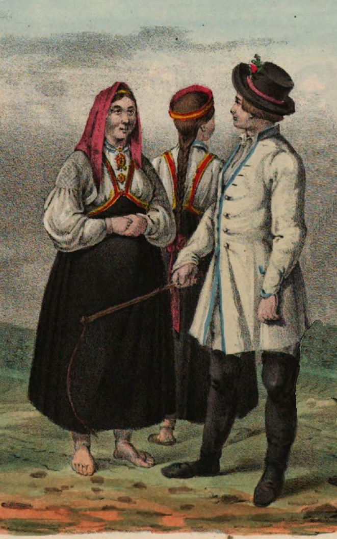 Tracht der Kurischen Könige. Aus dem Buch von Friedrich Kruse: Necrolivonica oder Alterthümer Liv-, Esth-, und Curlands (Dorpat 1842)